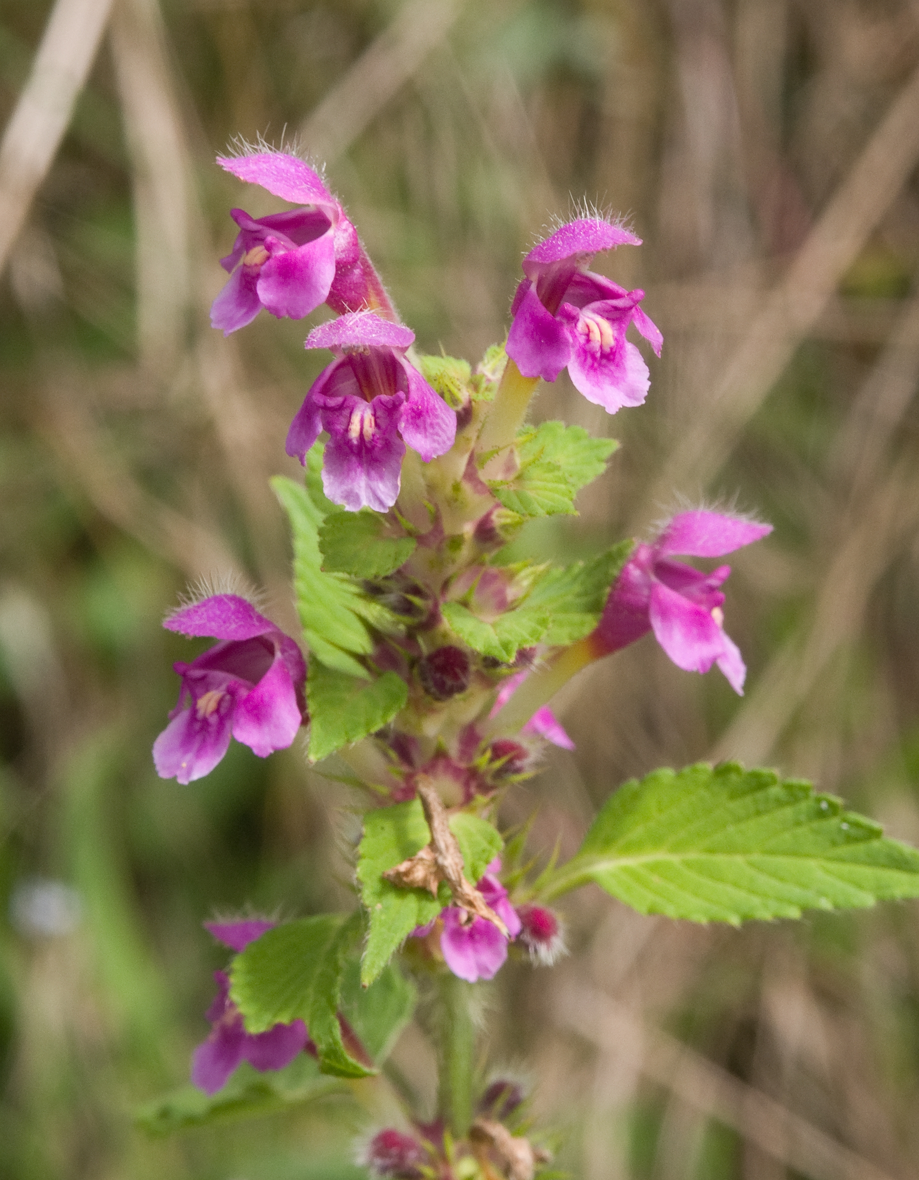 Galeopsis pubescens, Frankenhöhe, Deutschland